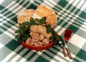 Maranho